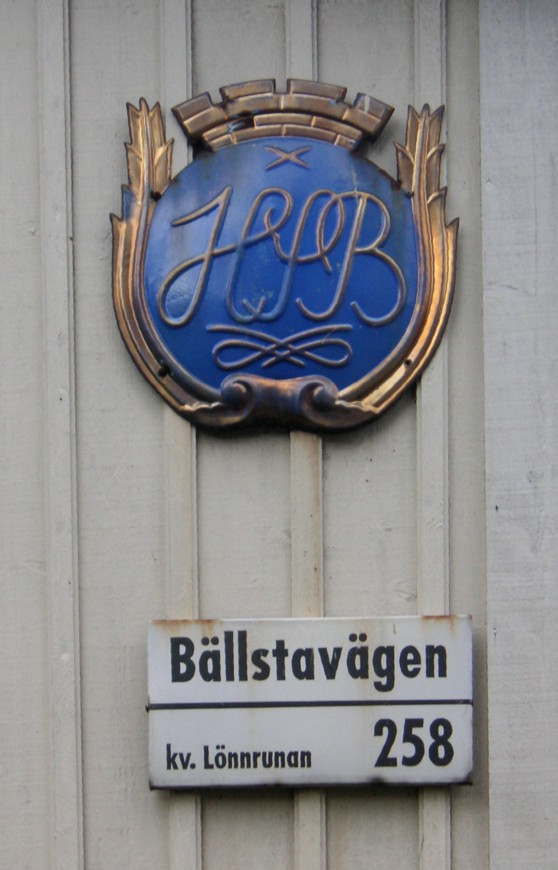 HSB:s radhus i Norra Ängby